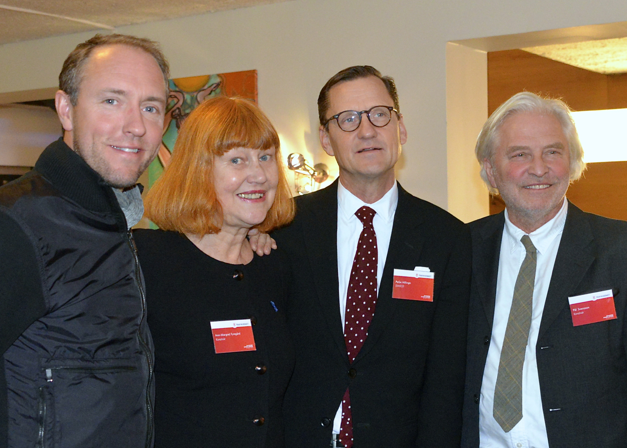 Mattias Klum, Ann-Margret Fyregård, PeGe Hillinge, Pål Svensson vid invigningen av Norra länken den 30 nov 2014.